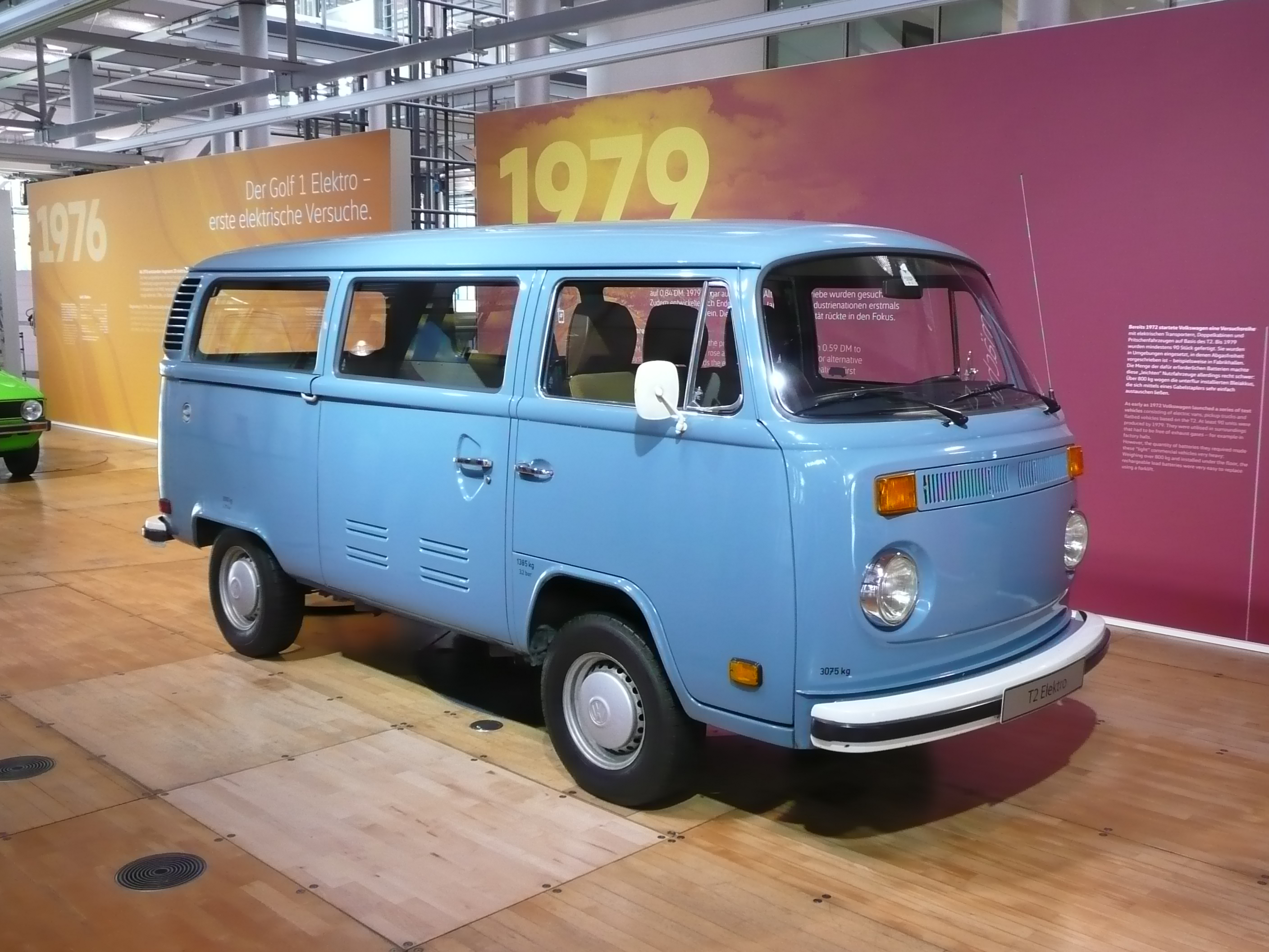 T2 Elektrotransporter aus dem Jahr 1979, ausgestellt in der Gläsernen Manufaktur